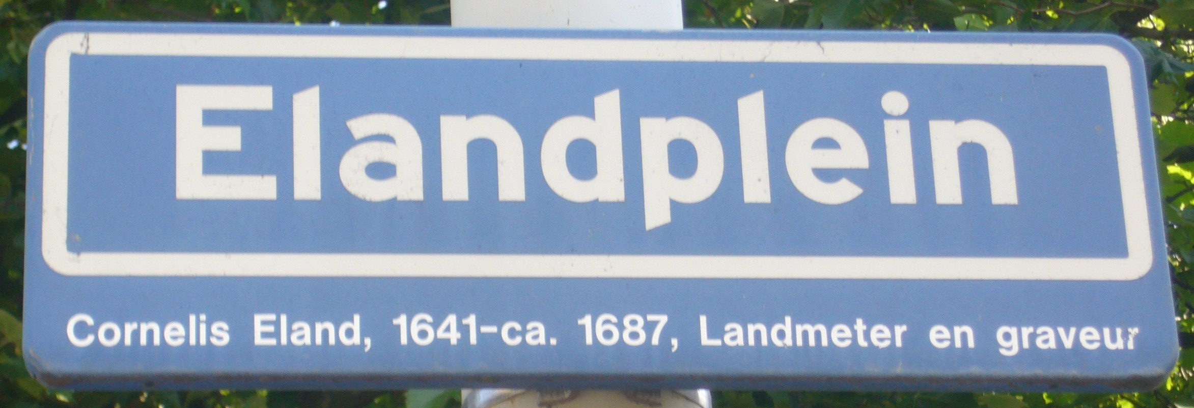 Elandplein, straatbordje